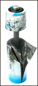 Zn-Mn (Kohle) BatterieUrheber des Photos: Anton (rp) 2004Nutzungsrechte freigegeben: GNU Free Documentation License.